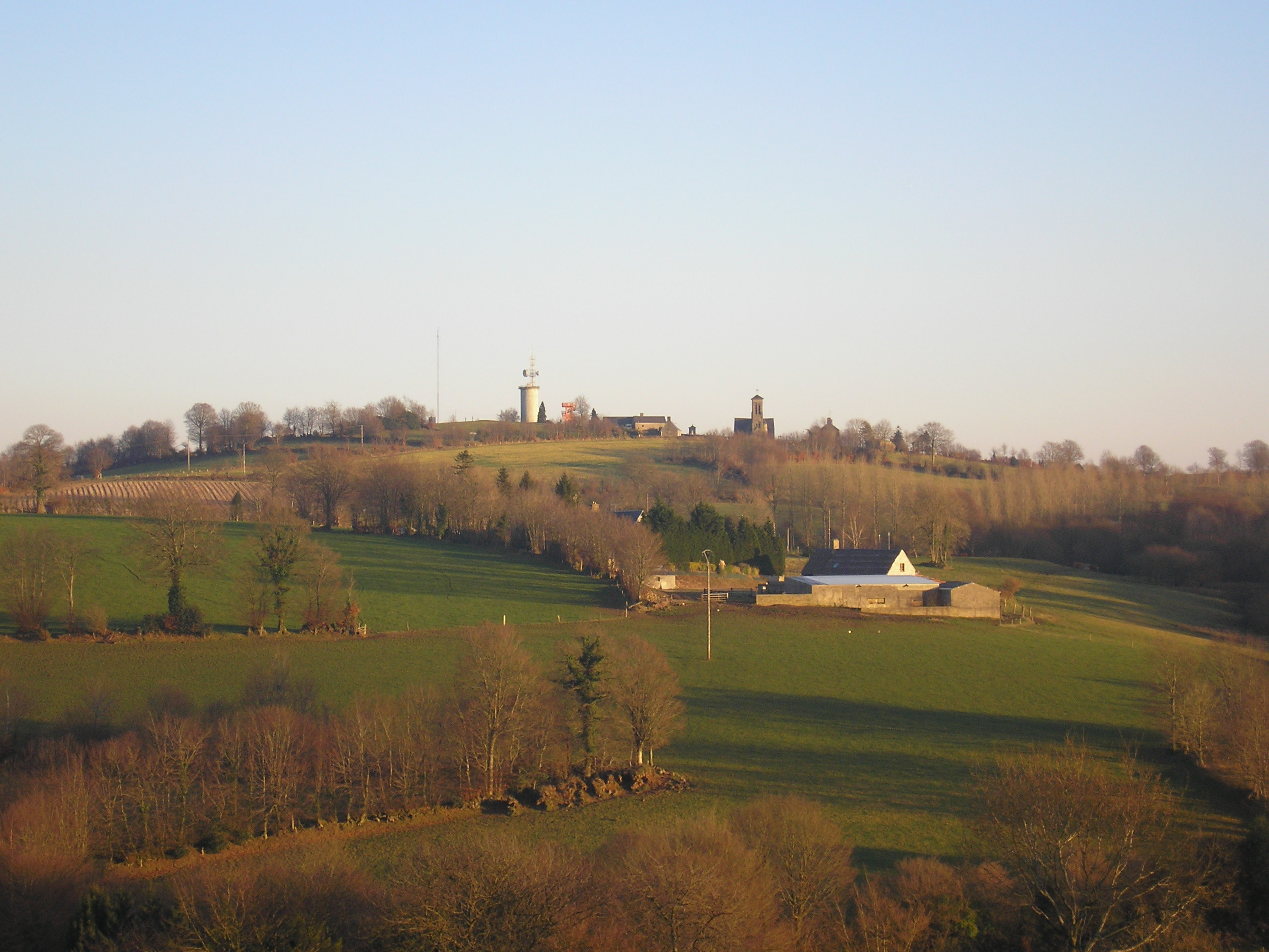 Chaulieu (Normandie, France). Saint-Martin-de-Chaulieu, point culminant du département de la Manche.